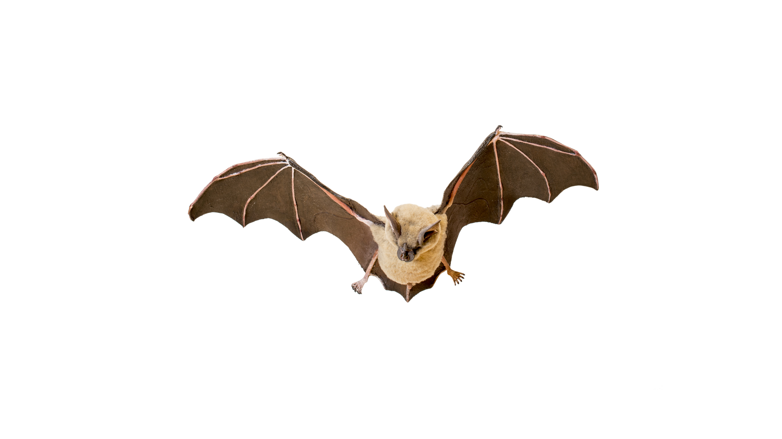 Ferro di cavallo maggiore. Replica in scala 2:1